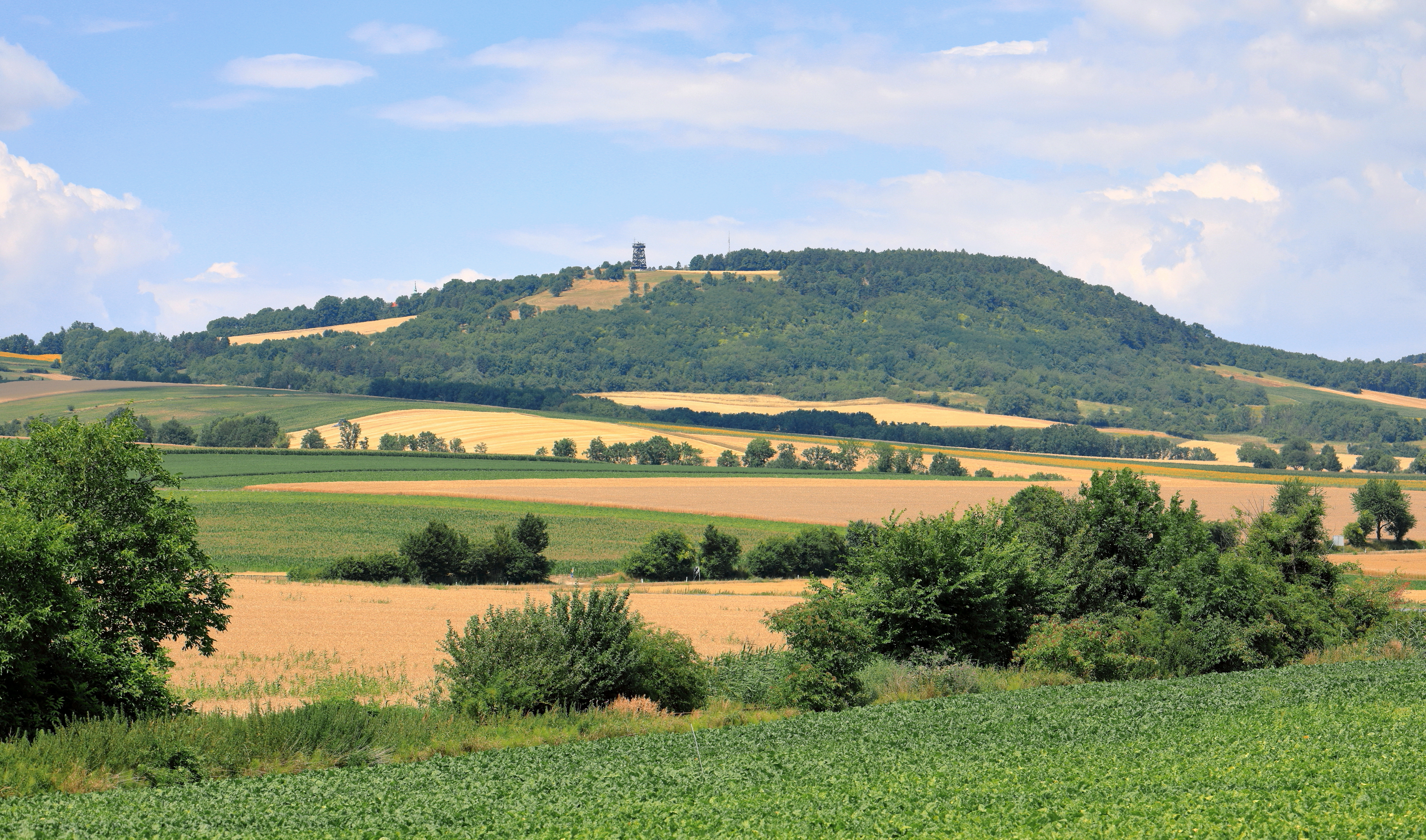 Südsüdostansicht des Oberleiser Berges im niederösterreichischen Weinviertel. Der 457 m hohe Berg befindet sich vorwiegend auf dem Gebiet der Marktgemeinde Ernstbrunn und der Südostabhang auf dem Gebiet der Gemeinde Niederleis. Auf dem Plateau gibt es Siedlungsnachweise aus der mittleren Jungsteinzeit, der frühen Bronzezeit, der Kelten und der Germanen. Im Mittelalter wurde eine Kirche und ein Friedhof errichtet, später eine Wallfahrtskirche, die jedoch 1784 geschlossen und 1787 abgetragen wurde. 1970 wurde der Aussichtsturm Oberleis mit einem kleinen archäologischen Ausstellungsraum im Erdgeschoss errichtet. Die Ausstellung dokumentiert unter anderem die befestigte germanische Höhensiedlung (4. bis 5. Jahrhundert n. Chr.) auf dem Plateau.